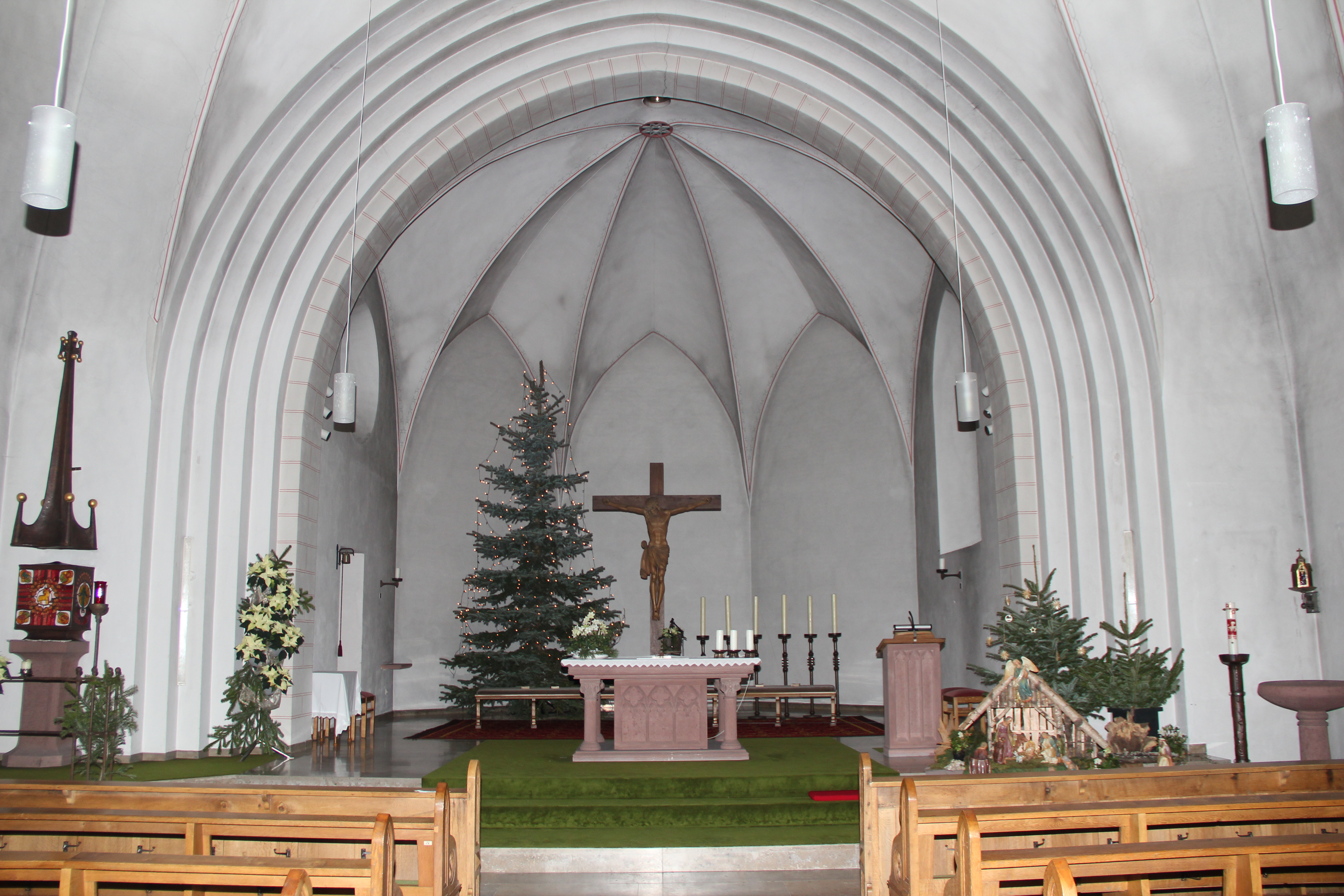 Innenansicht der Kirche St. Josef in Ostwig